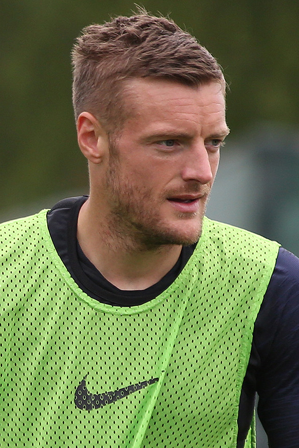 Каравай, самовар и сборная Англии. Кейн и компания готовятся к ЧМ-2018